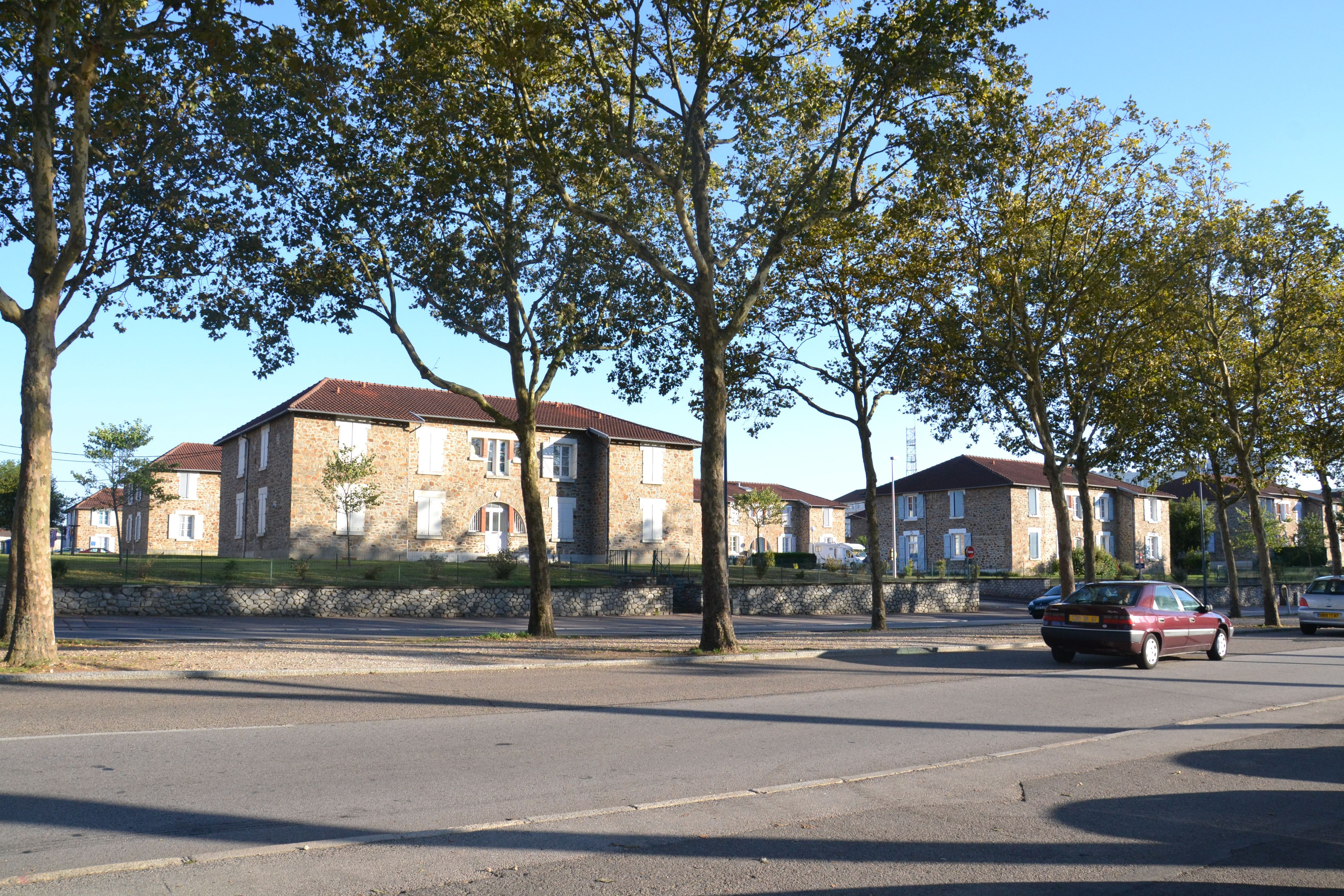 Cité-jardin de Beaublanc, à Limoges (Haute-Vienne, France).